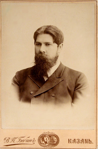 Малоизвестная фотография В.М.Бехтерева. Казань, 1881 год.